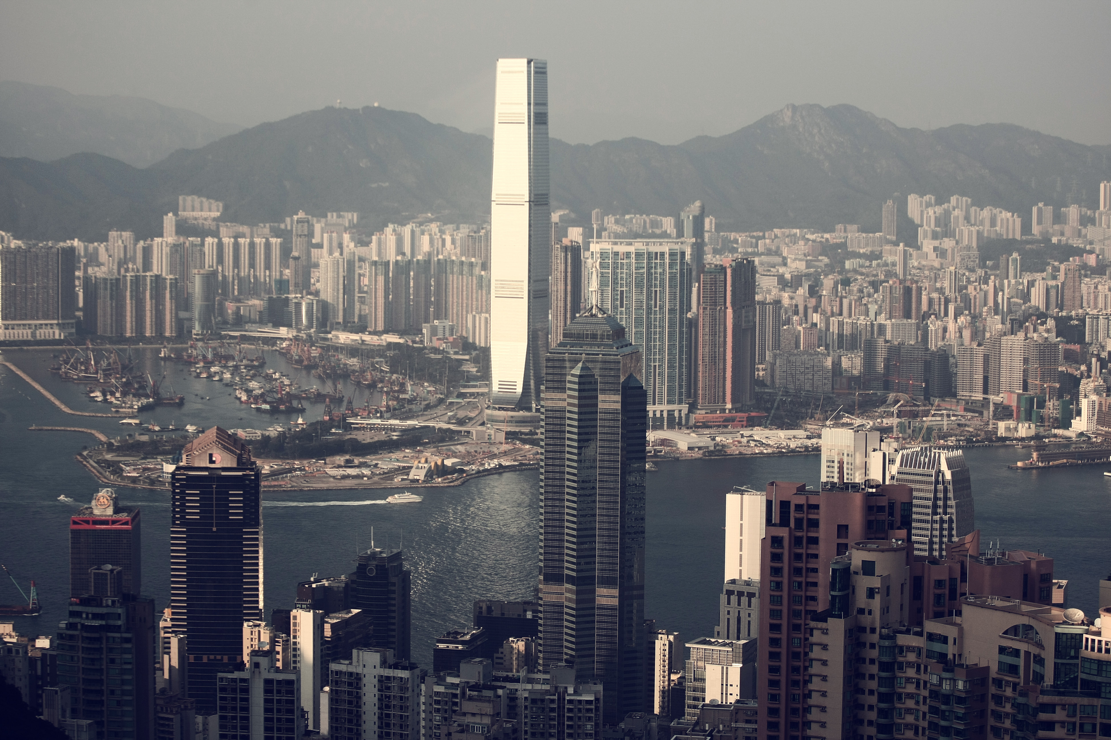 Victoria Harbor and ICC building in West Kowloon, Hong Kong.